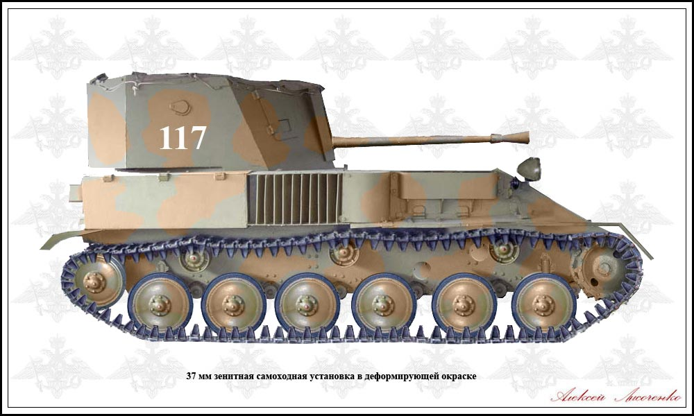 Зенитная самоходная установка 1937